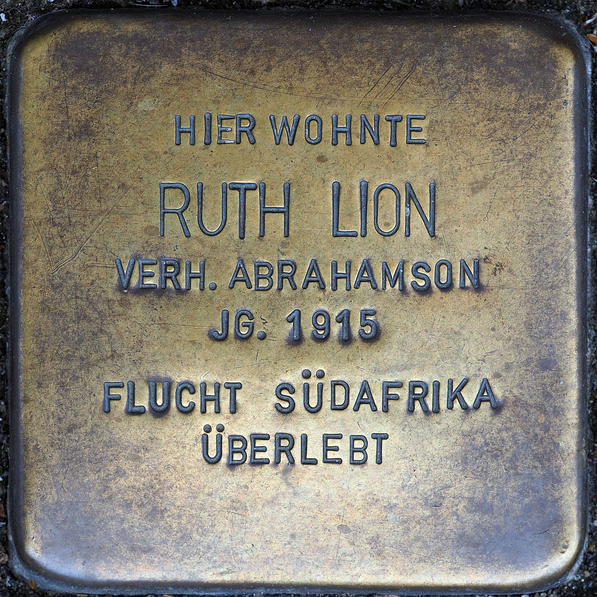 Stolpersteine Wesel: Lion, Ruth